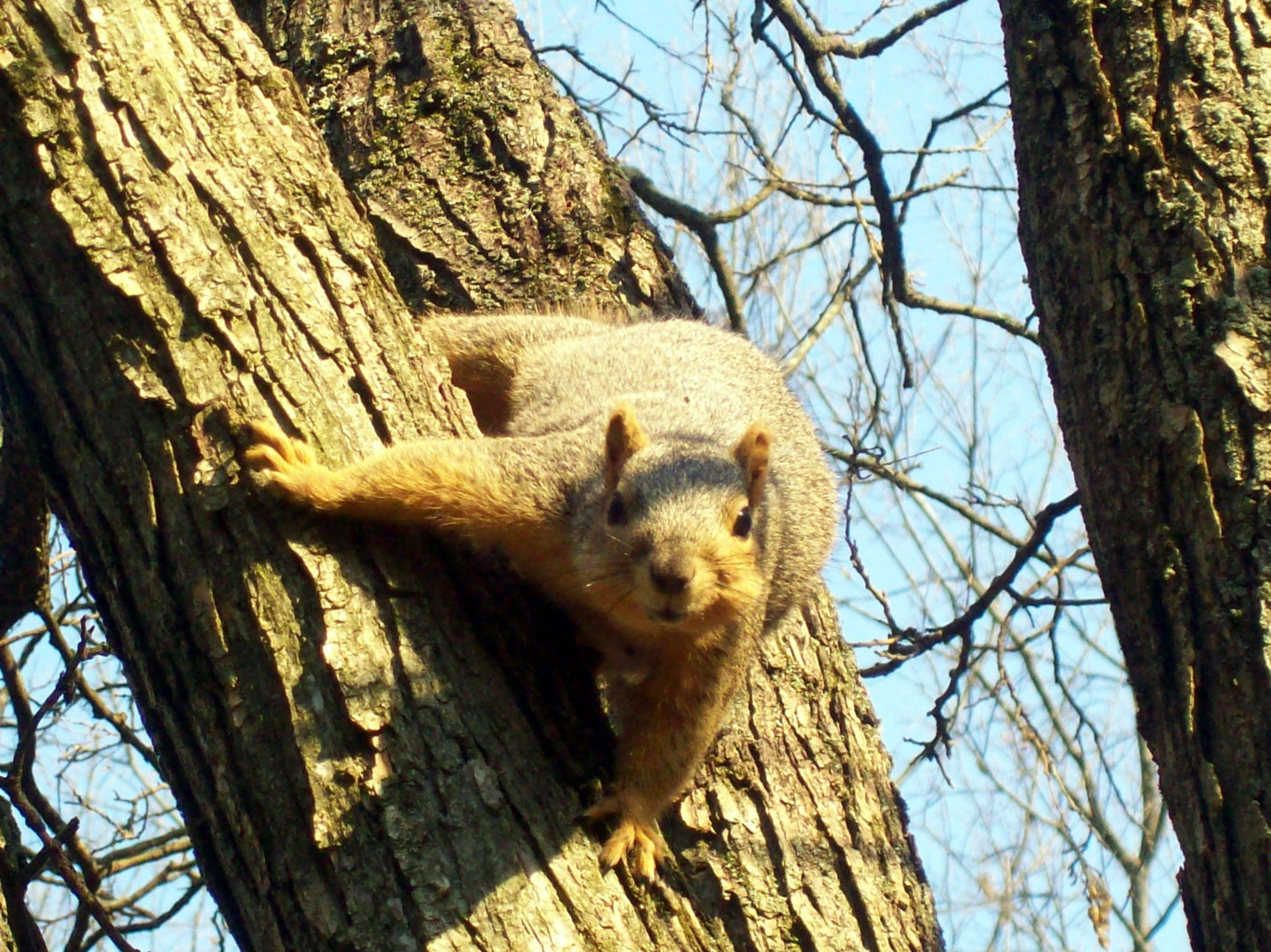 Fox squirrel at Morton Arboretum, IL